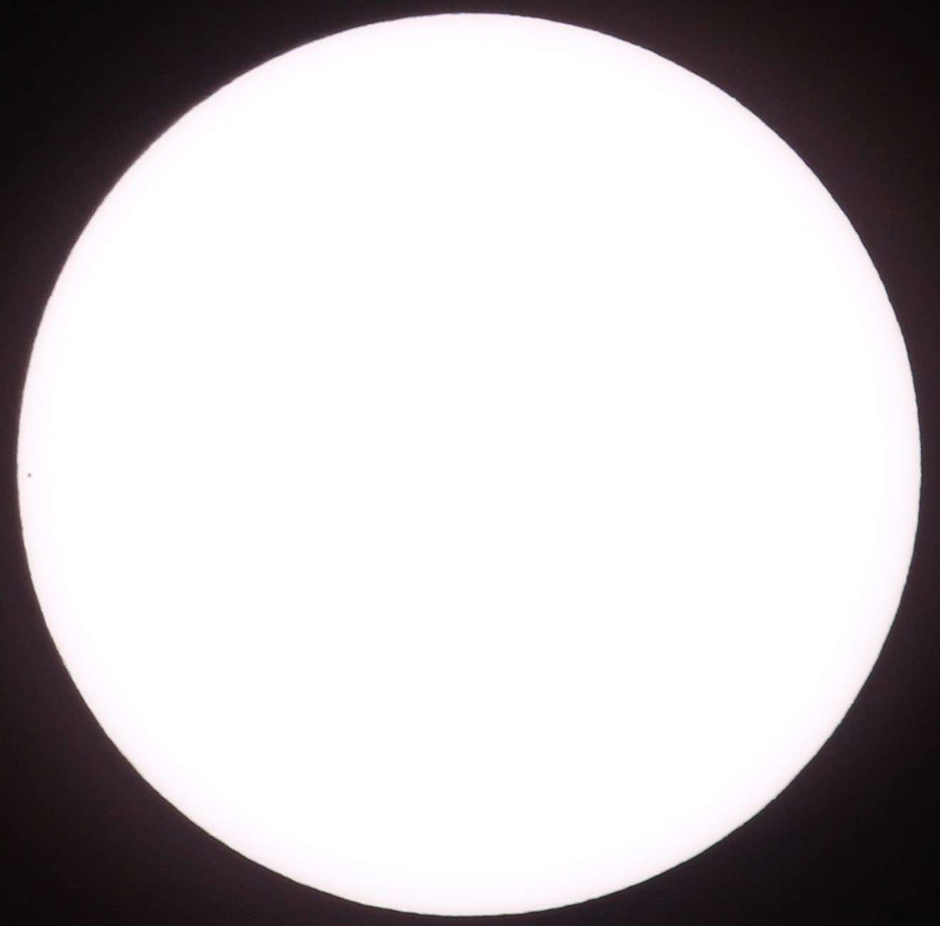 Début du transit de Mercure du 11 novembre 2019 vu de Villeurbanne. Mercure est tout proche du bord gauche du Soleil. Téléobjectif de 600 mm.